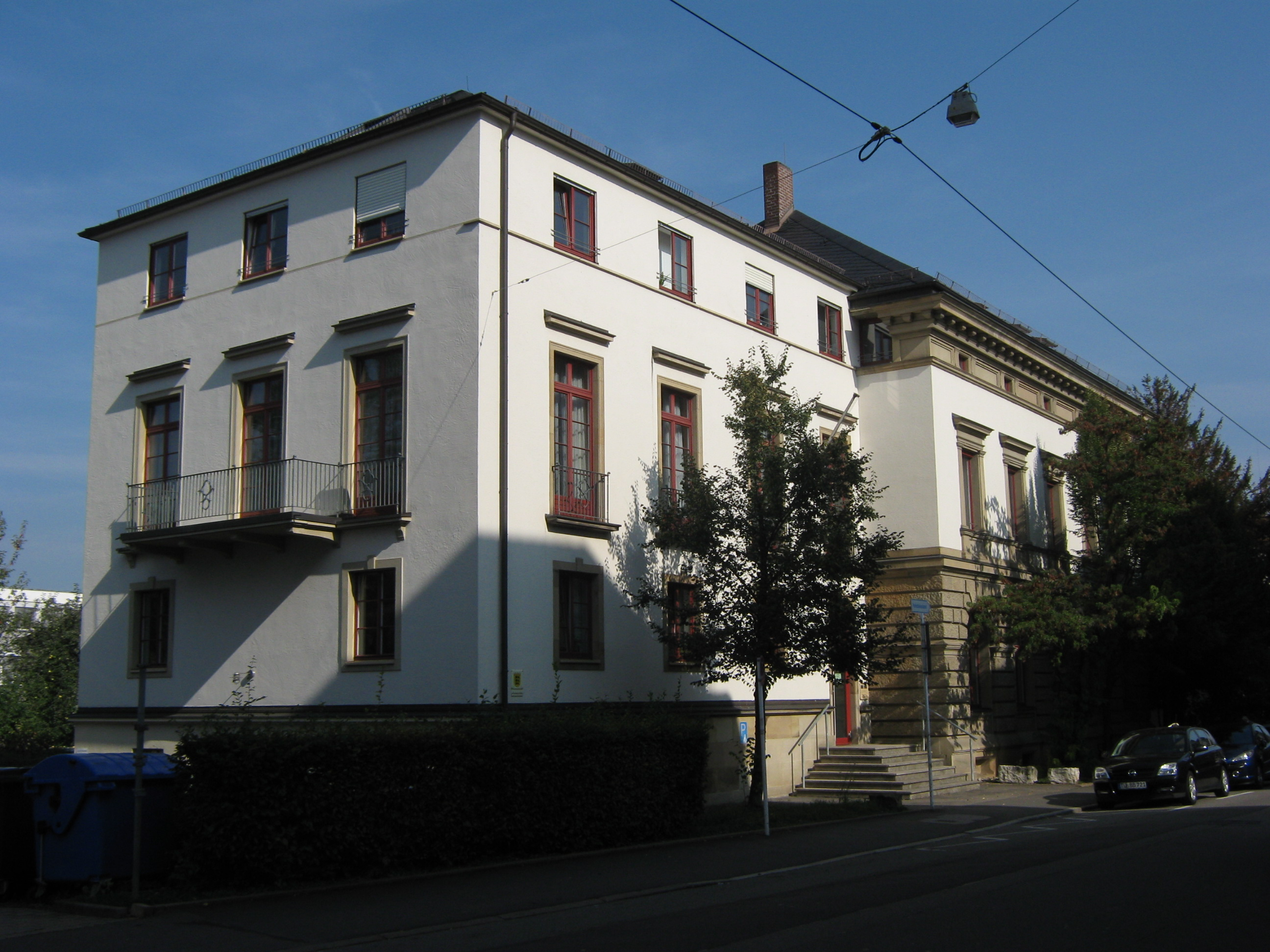 Das Gebäude in der Schulstr. 11 in Reutlingen wurde 1890 gebaut und von der Reichsbank genutzt. Nach einer zwischenzeitlichen Nutzung durch das Finanzamt ist dort seit einigen Jahren das Sozialgericht untergebracht.